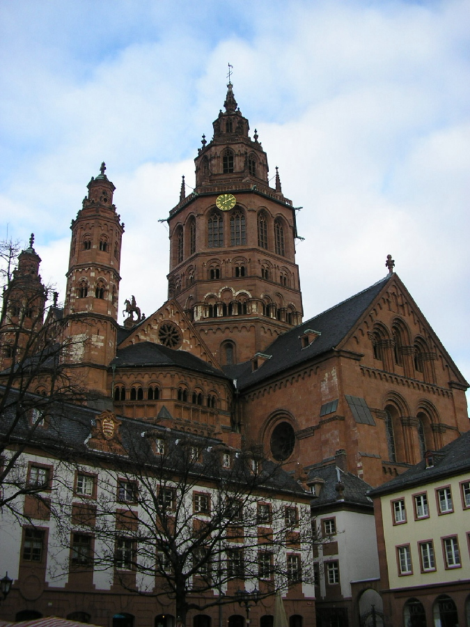 Description in de wikipedia Bildmotiv: Mainzer Dom von sw; Quelle: eigene Fotografie vom 03.01.2005 Lizenz: GNU-FDL